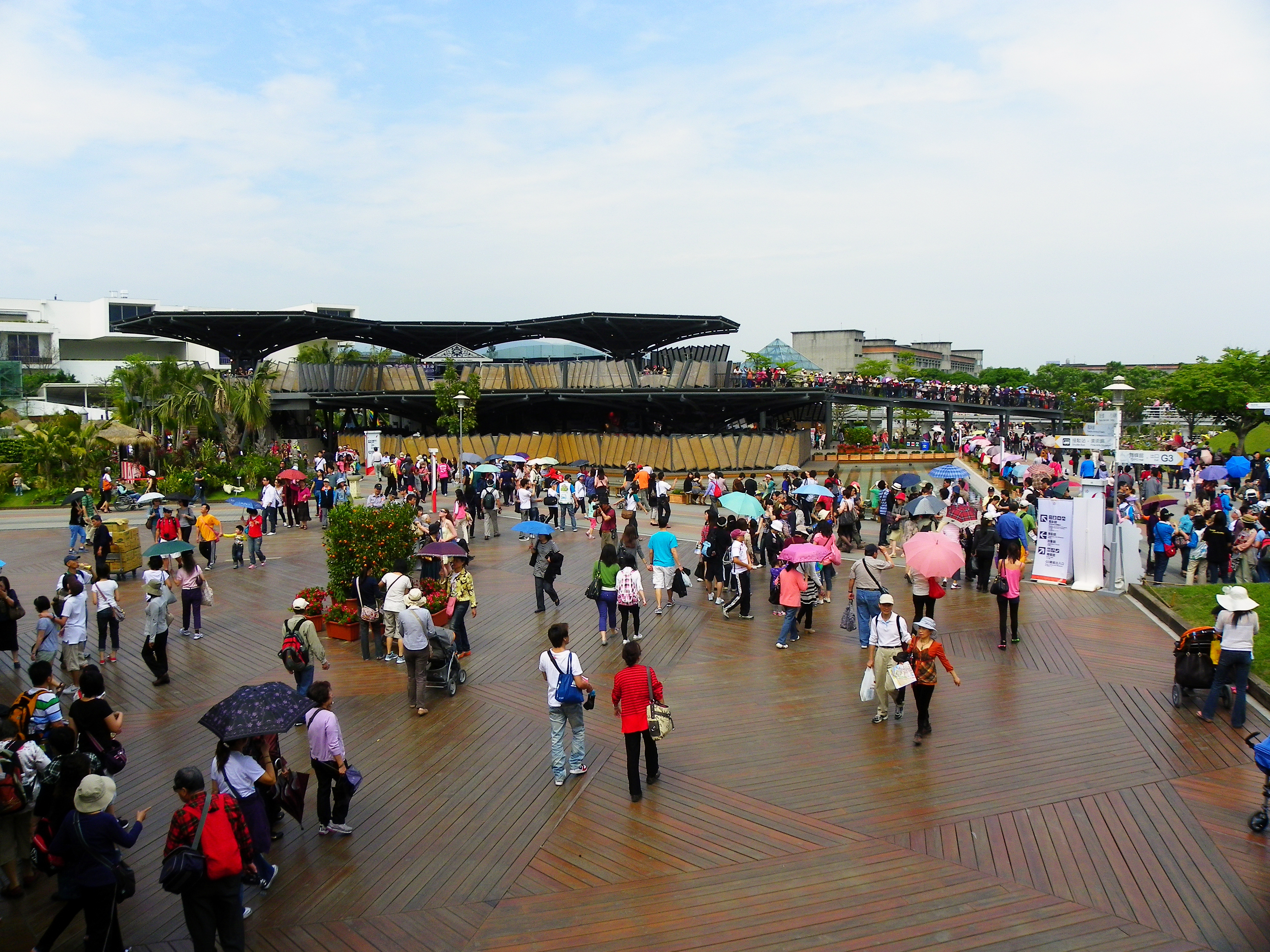 自中山北路陸橋東望美術公園風味館。